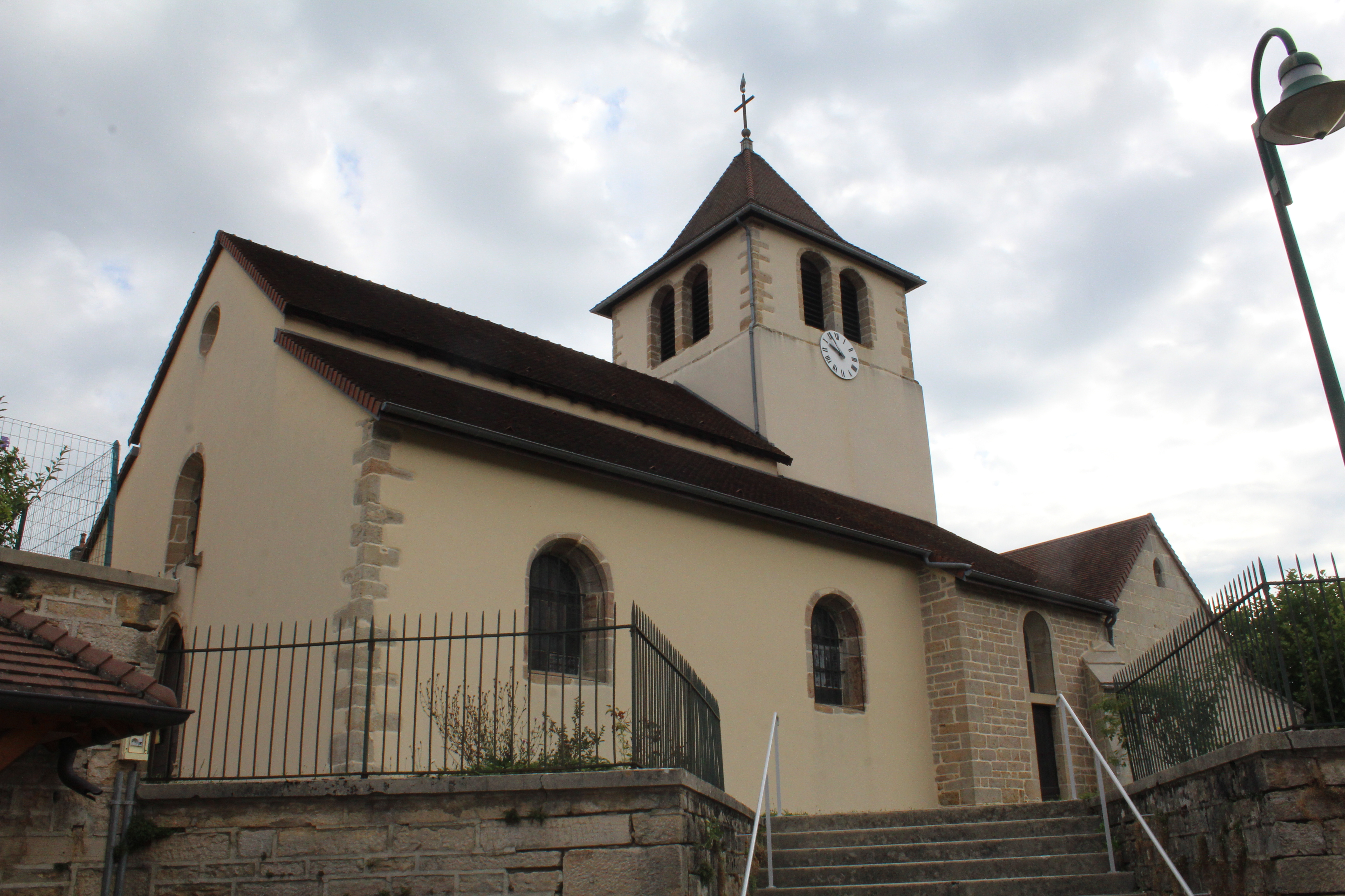 Église de l'Assomption-de-la-Bienheureuse-Vierge-Marie de Vincelles, Val-Sonnette.